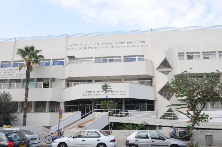 בנין המרכז לשיקום ע"ש אידה סוראסקי ברחוב הנרייטה סולד תל אביב